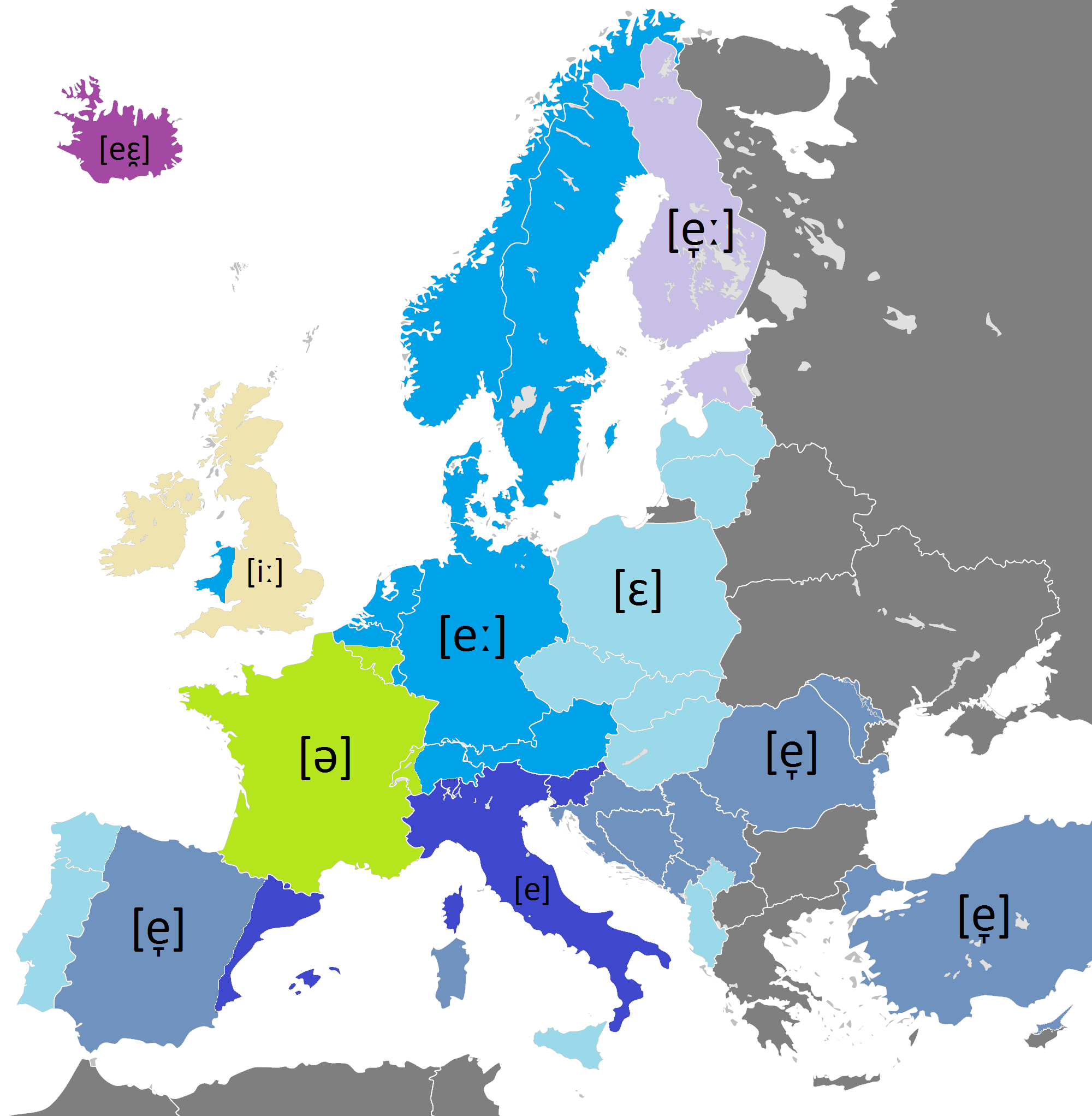 ഇ എന്ന അക്ഷരം യൂറോപ്യൻ രാജ്യങ്ങളിലെ ഉച്ചാരണം